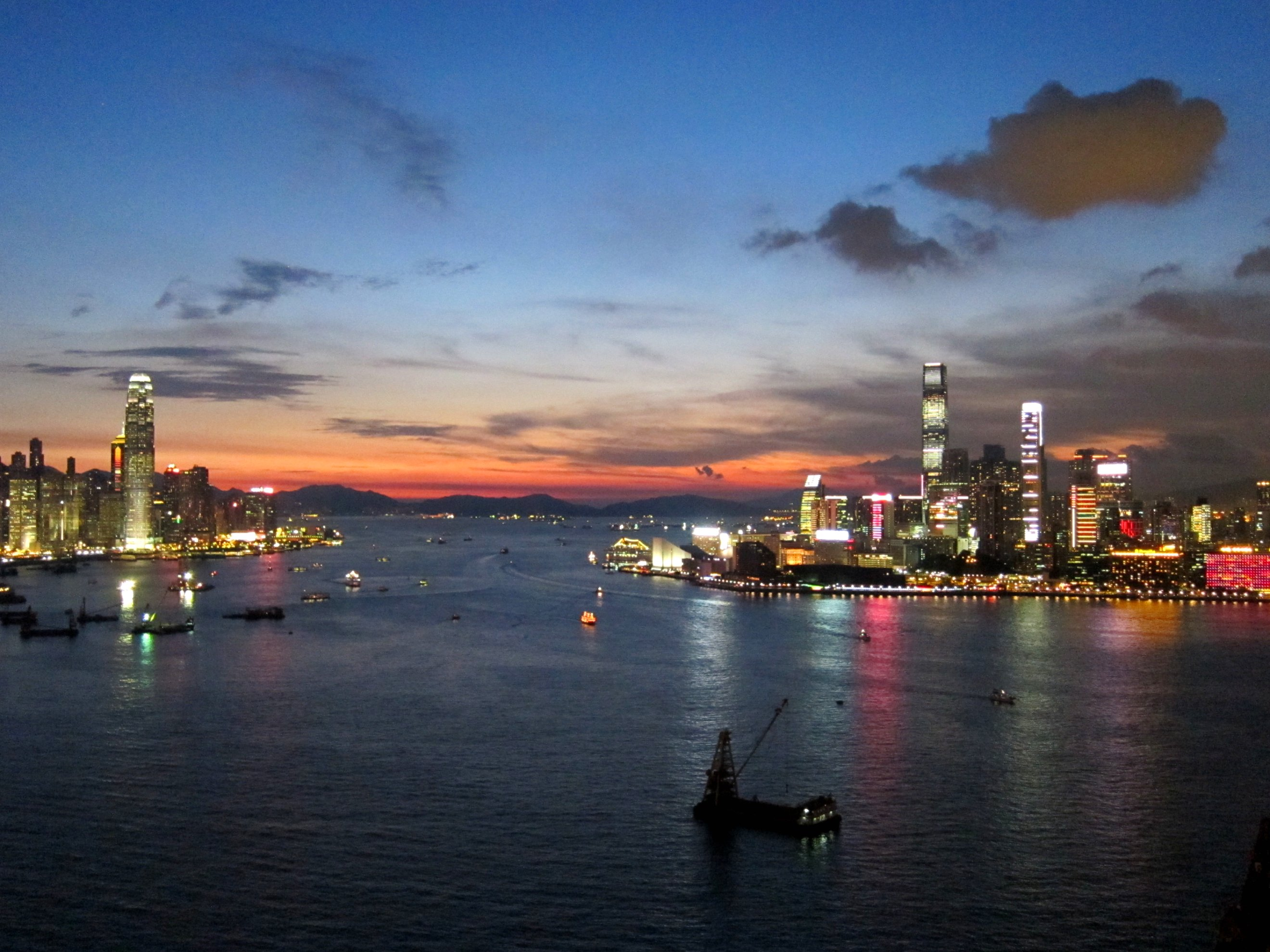 HK Harbour at Dusk